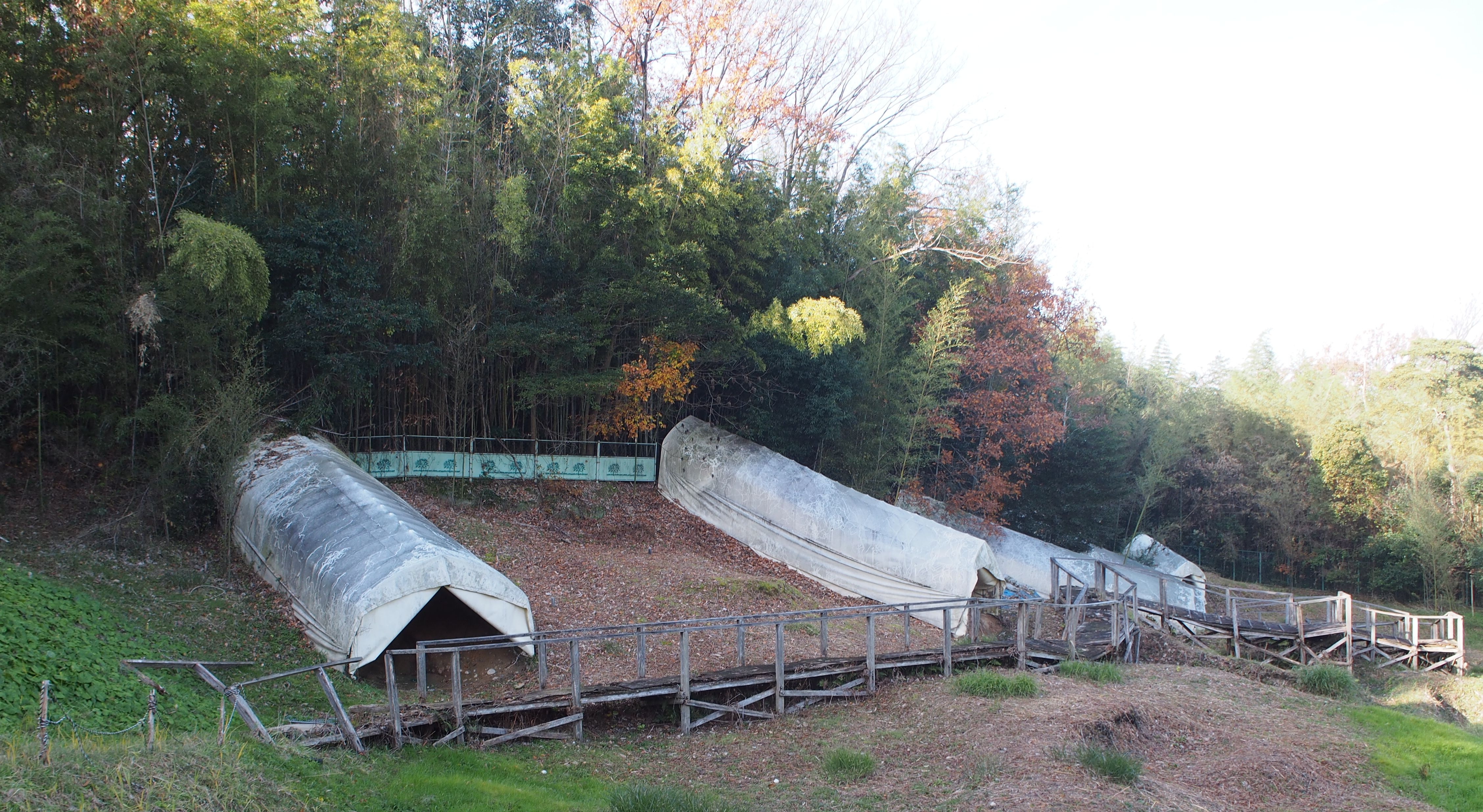 2019年12月に撮影。下原古窯跡A全景。